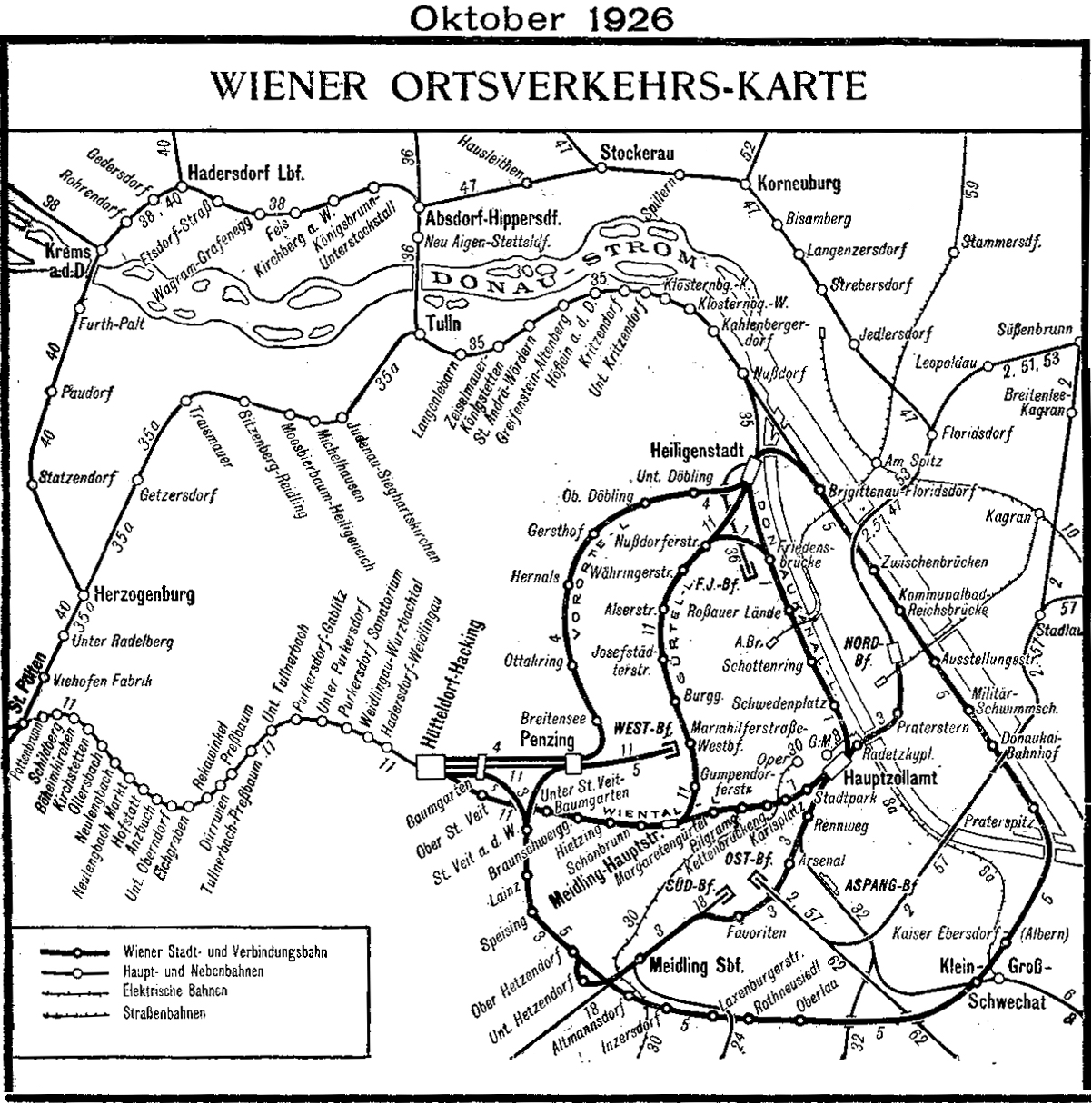 Wiener Stadt- und Verbindungsbahn, Wiener Ortsverkehrs-Karte, Oktober 1926